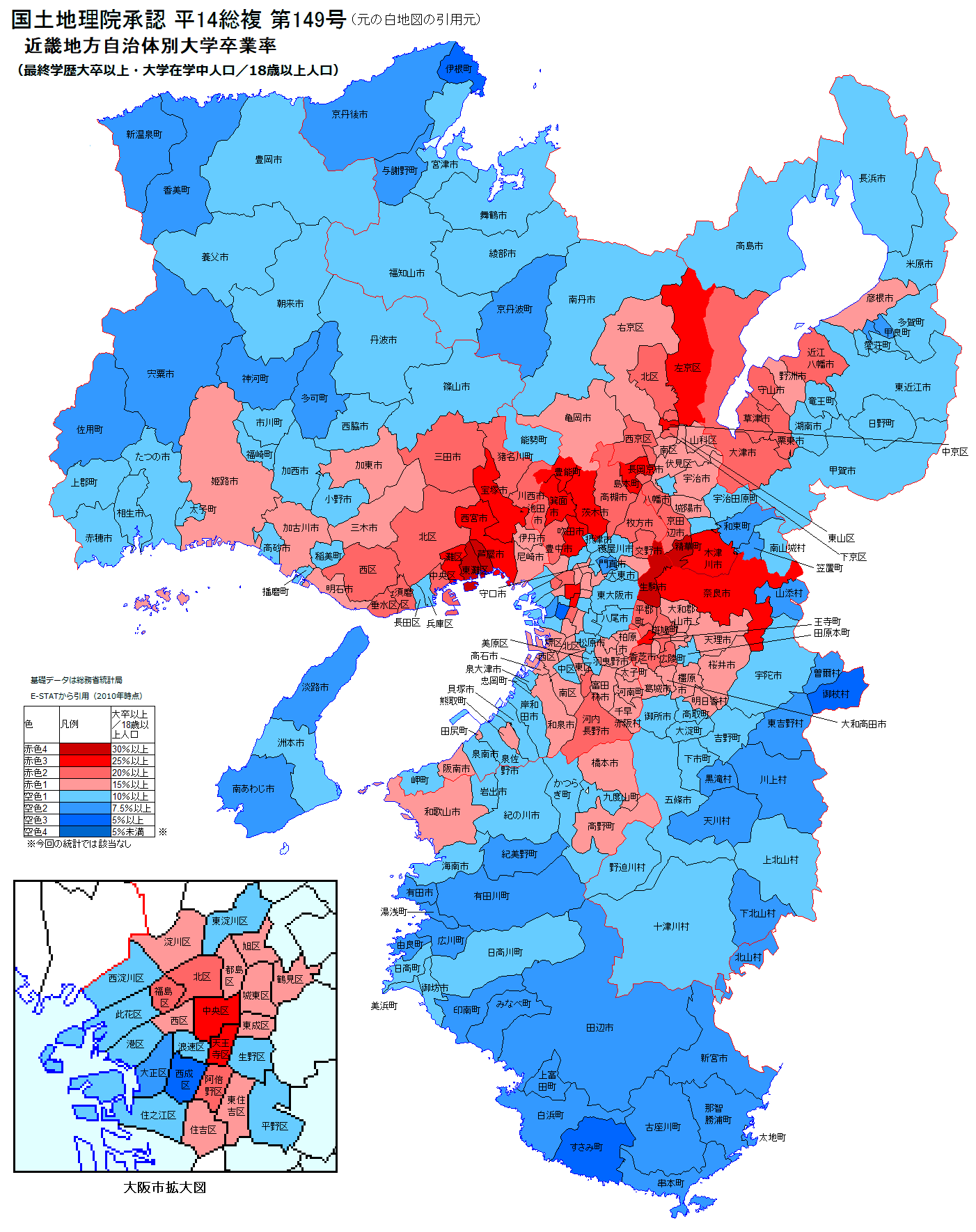 近畿地方の自治体別大卒者率